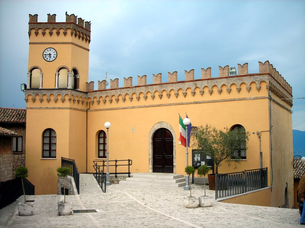 Rathaus der Gemeinde Giano dell'Umbria, Perugia, Umbria, Italien